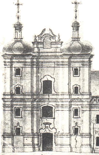 Беларуская (тарашкевіца): Берасьце (Bieraście), пляц Бэрнардынскі (plac Bernardynski). Касьцёл Беззаганнага Зачацьця Найсьвяцейшай Панны Марыі і кляштар бэрнардынак